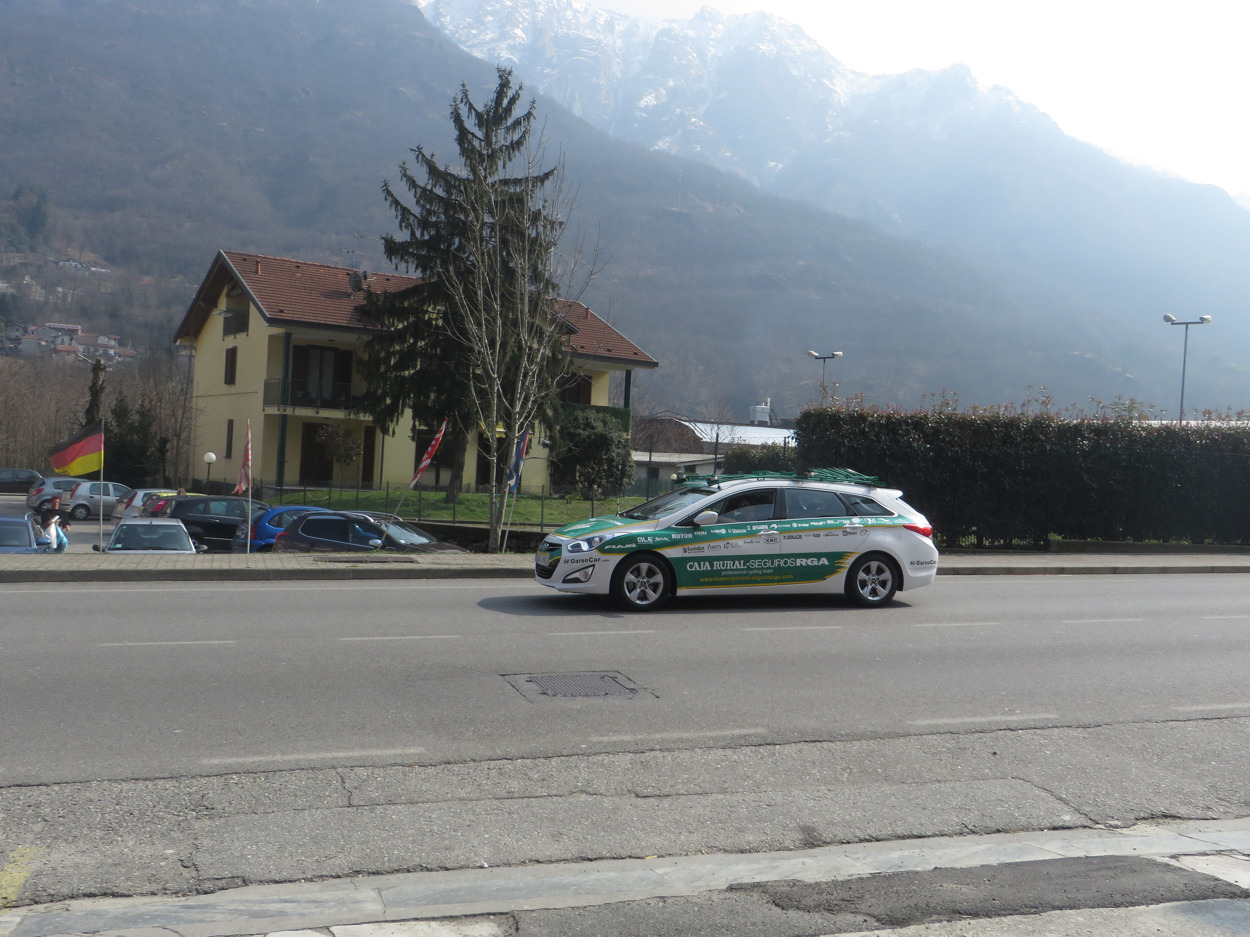 Ammiraglia Caja Rural Gran Premio Nobili Rubinetterie 2015.